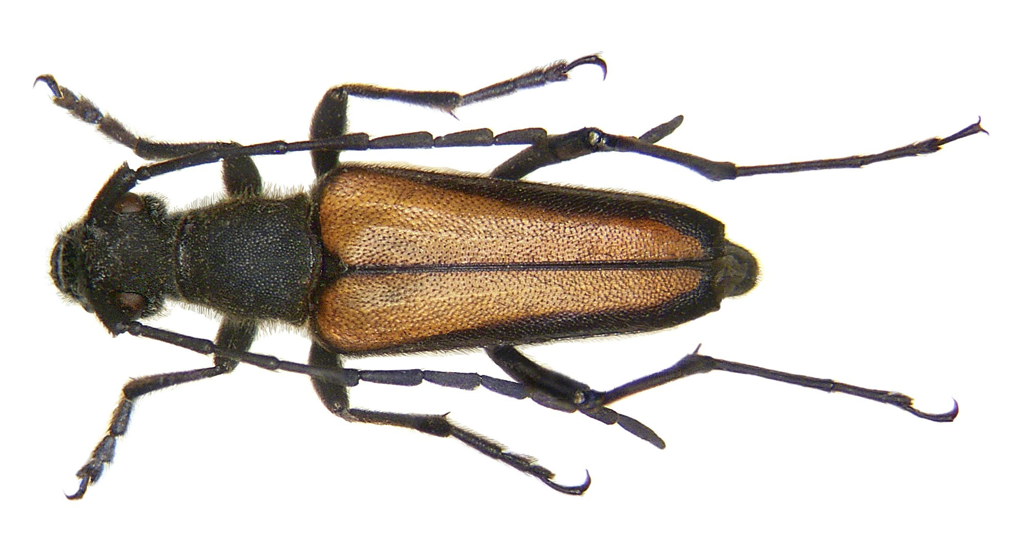 Familie: Cerambycidae Grösse: 9-16 mm Verbreitung: Europa Ökologie: Entwicklung inNadelholz Fundort: Germania, Oberbayern, Osterseen leg.det. U.Schmidt, 1975 Foto: U.Schmidt, 2006